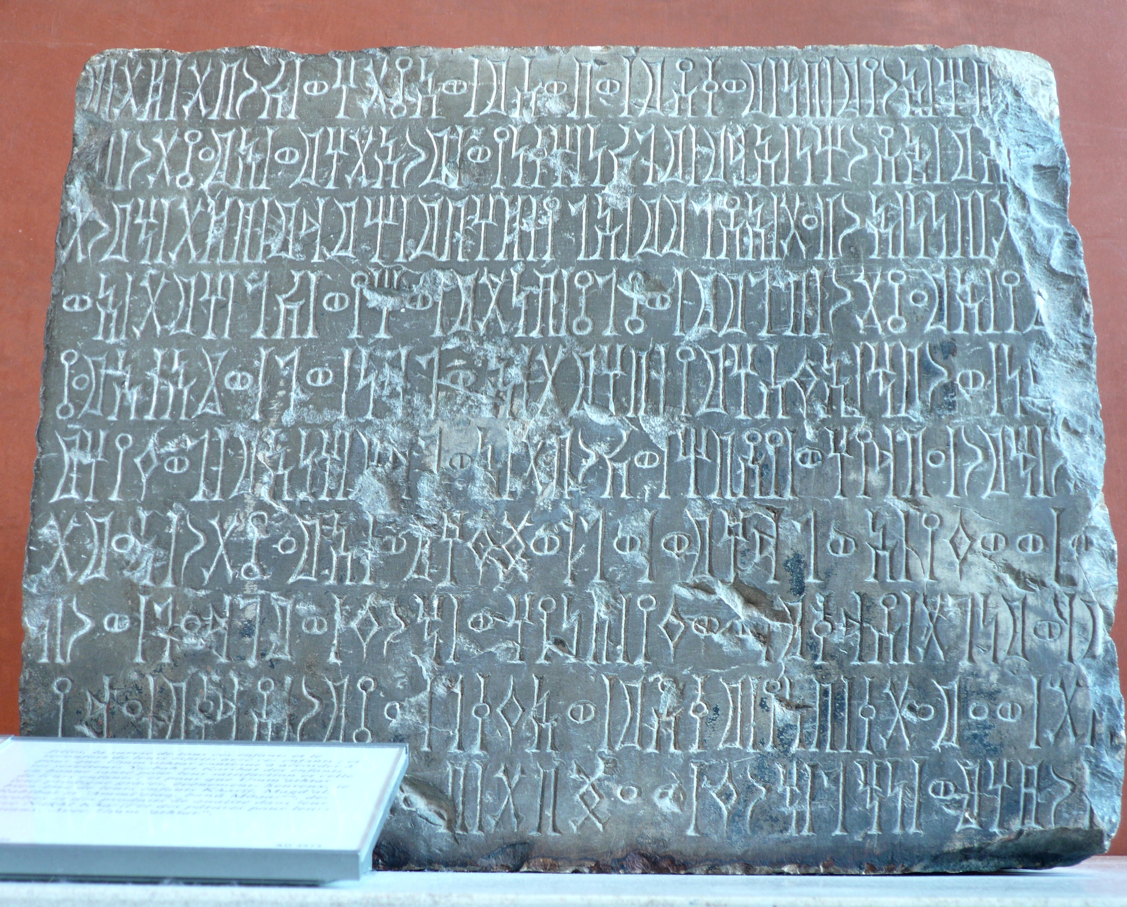 Sabaeic inscription in Louvre